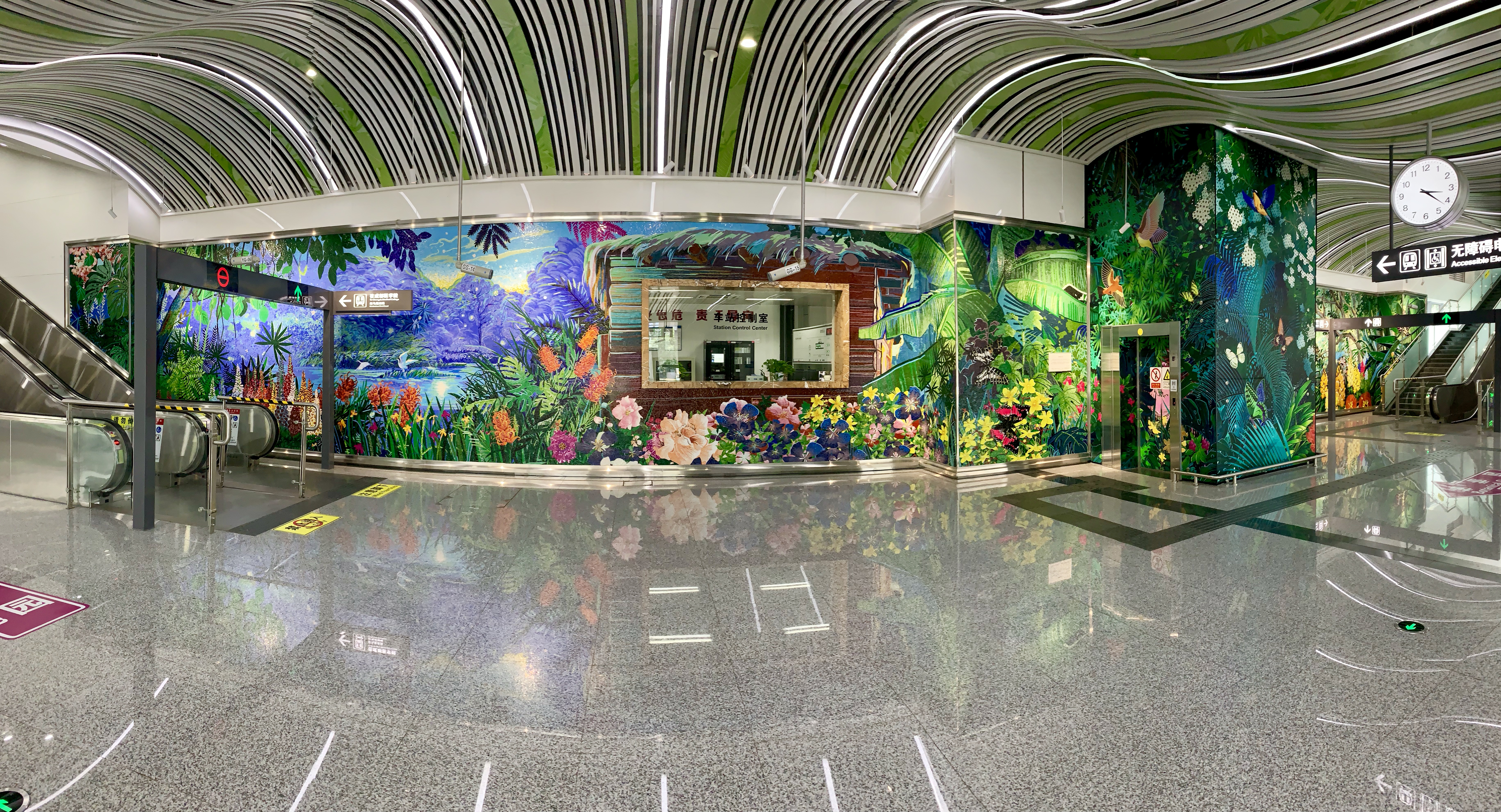 成都地铁植物园站